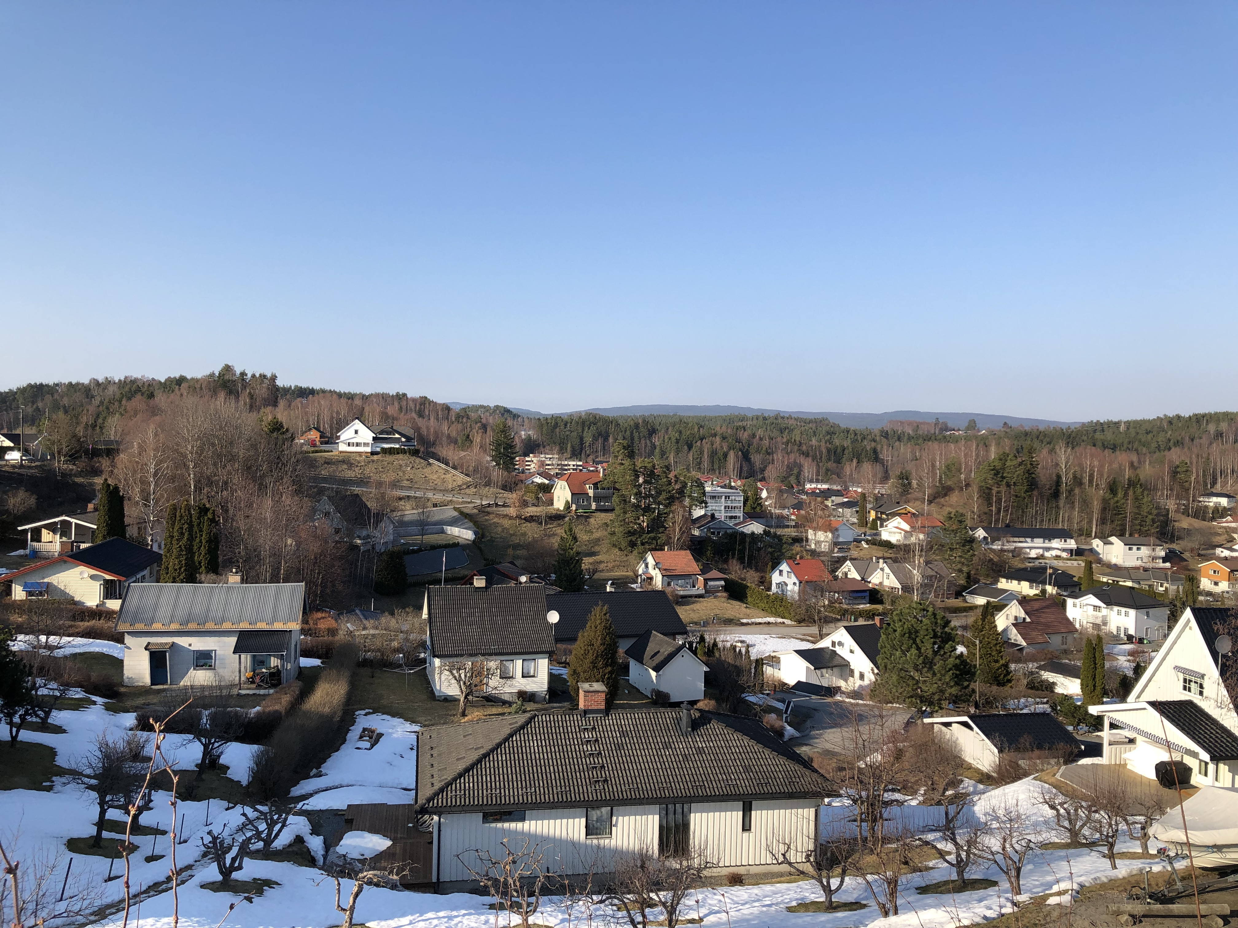 Lageshallen i Hønefoss, bilde fra Lageshallveien.